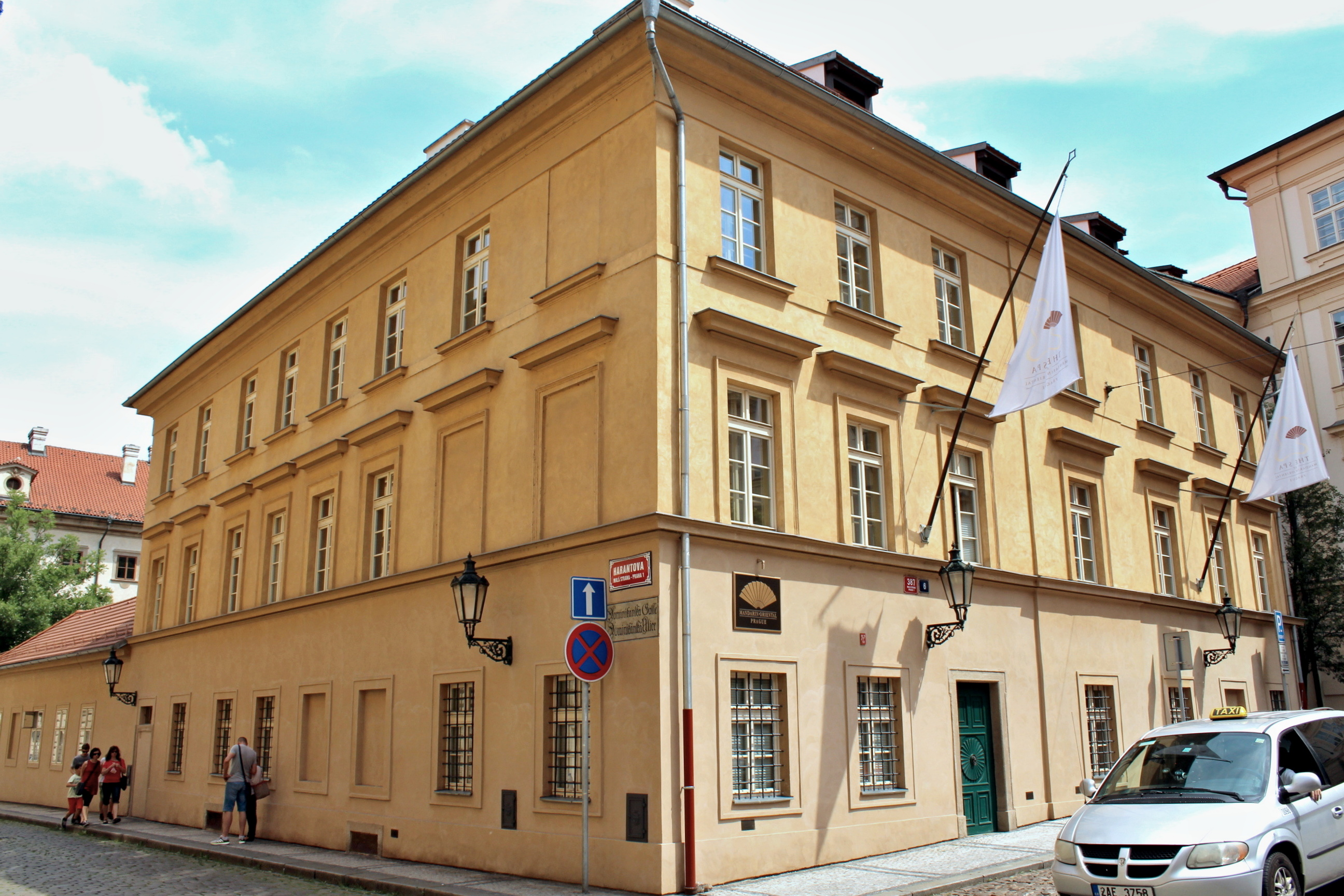 Dominikánský klášter na Malé Straně